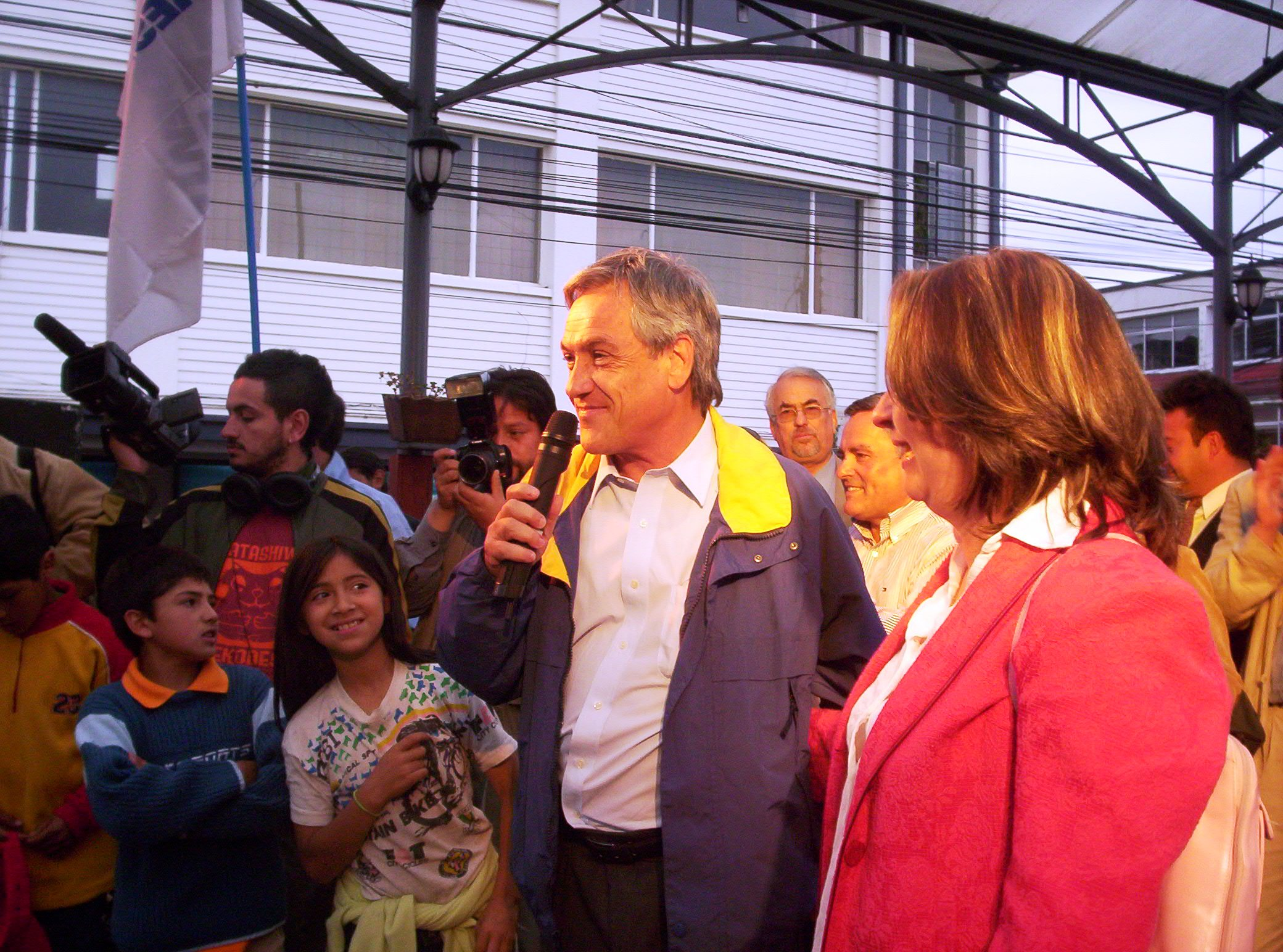 Sebastián Piñera en Puerto Varas, Chile, durante su campaña presidencial en 2006.